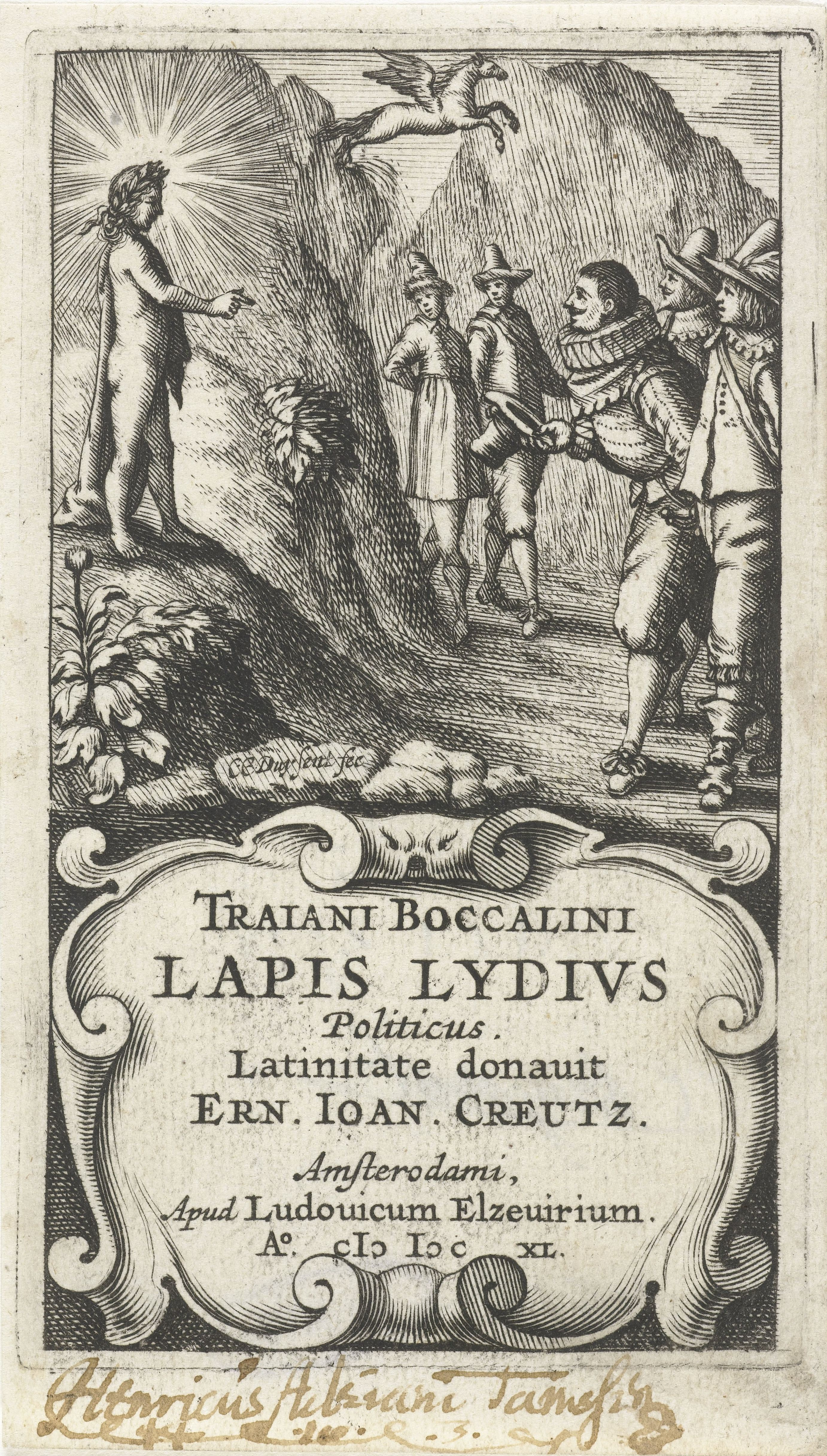 IdentificatieTitel(s): Drie mannen buigen voor ApolloTitelpagina voor T. Boccalini, Lapis Lydivs politicus, 1640Objecttype: prent titelpagina Objectnummer: RP-P-1883-A-7518Opschriften / Merken: verzamelaarsmerk, verso, gestempeld: Lugt 2228verzamelaarsmerk, recto, handschrift: ‘Henricus Adriani Tamssi[?]’Omschrijving: Drie mannen komen bij de zonnegod Apollo die op een heuvel staat. De middelste man buigt voor de god. In de lucht een gevleugeld paard.VervaardigingVervaardiger: prentmaker: Cornelis Claesz. Duysend (vermeld op object)uitgever: Lowijs Elzevier (III) (vermeld op object)Plaats vervaardiging: AmsterdamDatering: 1640Fysieke kenmerken: gravureMateriaal: papier Techniek: graveren (drukprocedé)Afmetingen: plaatrand: h 107 mm × b 63 mmOnderwerpWat: (story of) Apollo (Phoebus)Verwerving en rechtenCredit line: Schenking van jhr. V. de StuersVerwerving: schenking 1883Copyright: Publiek domein